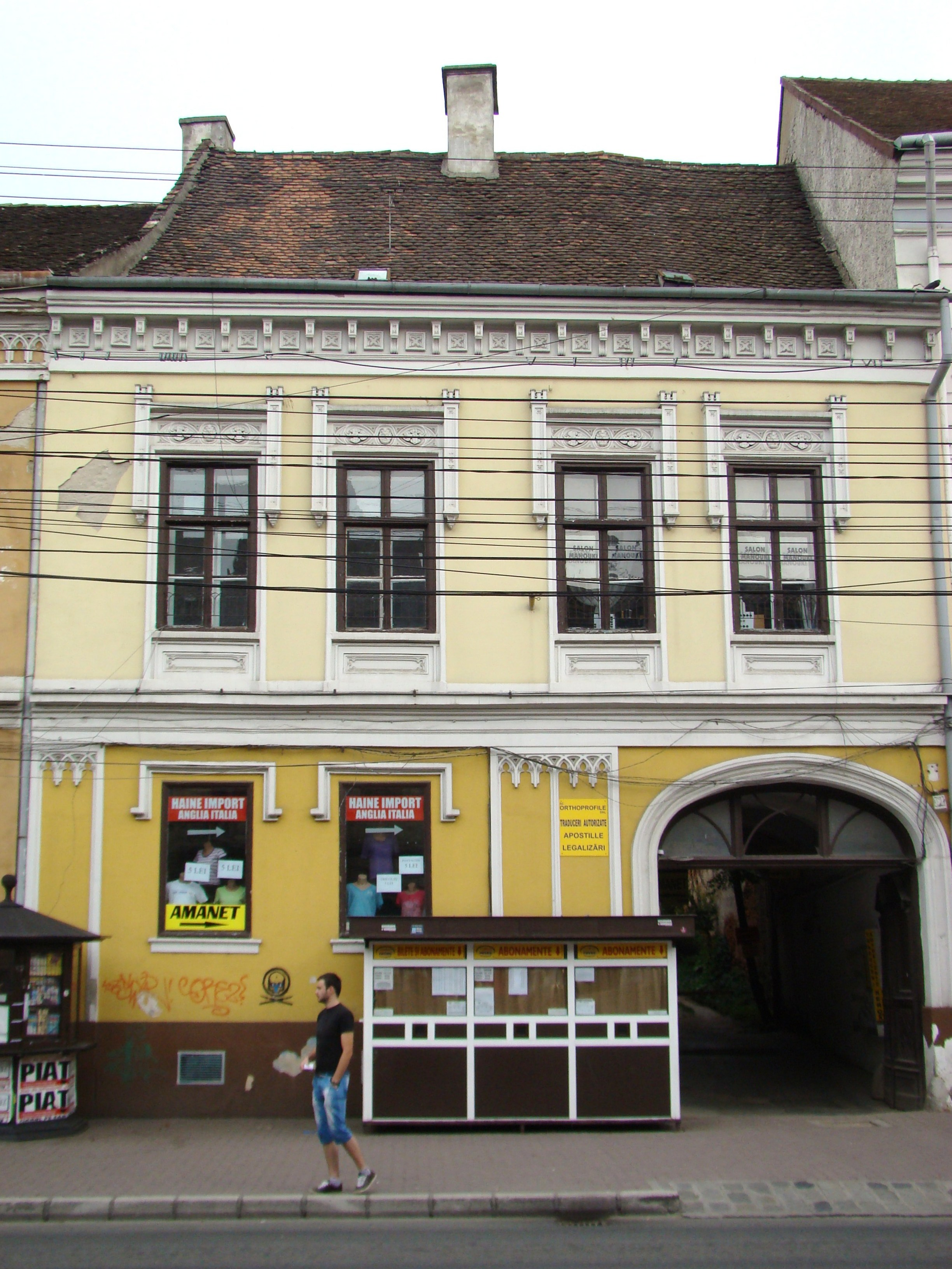 Clădire monument istoric, str. Memorandumului, nr. 19